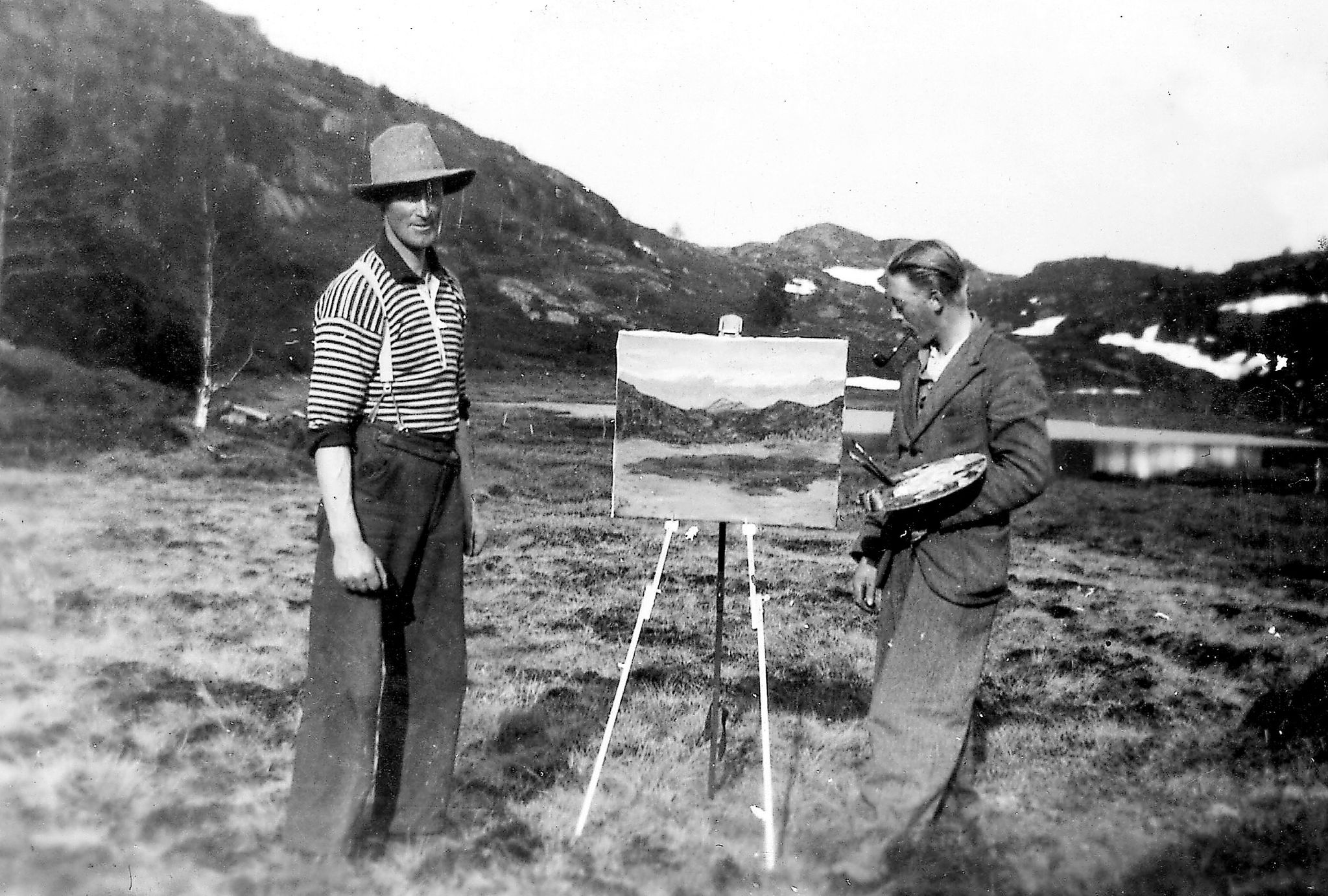 Kunstmalerne Cato Augensen (venstre) og Hans Kristian Ziegler (høyre) i i Sør-Audnedal, 1934.